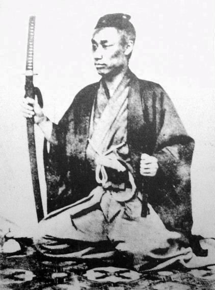 a Japanese man 福岡孝悌 (Takachika Fukuoka)